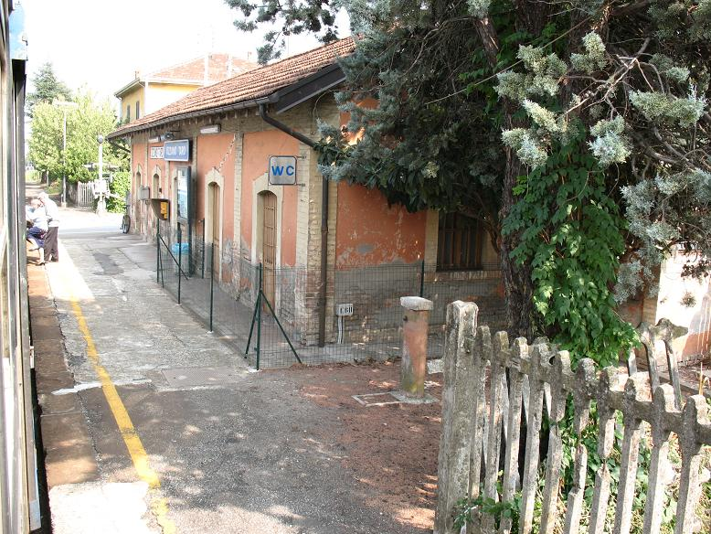 Stazione ferroviaria di Ozzano Taro.